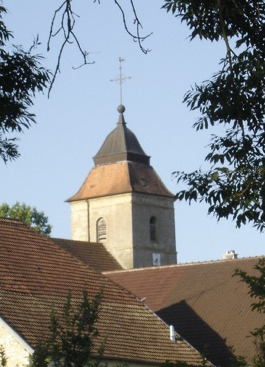 Clocher Etrepigney